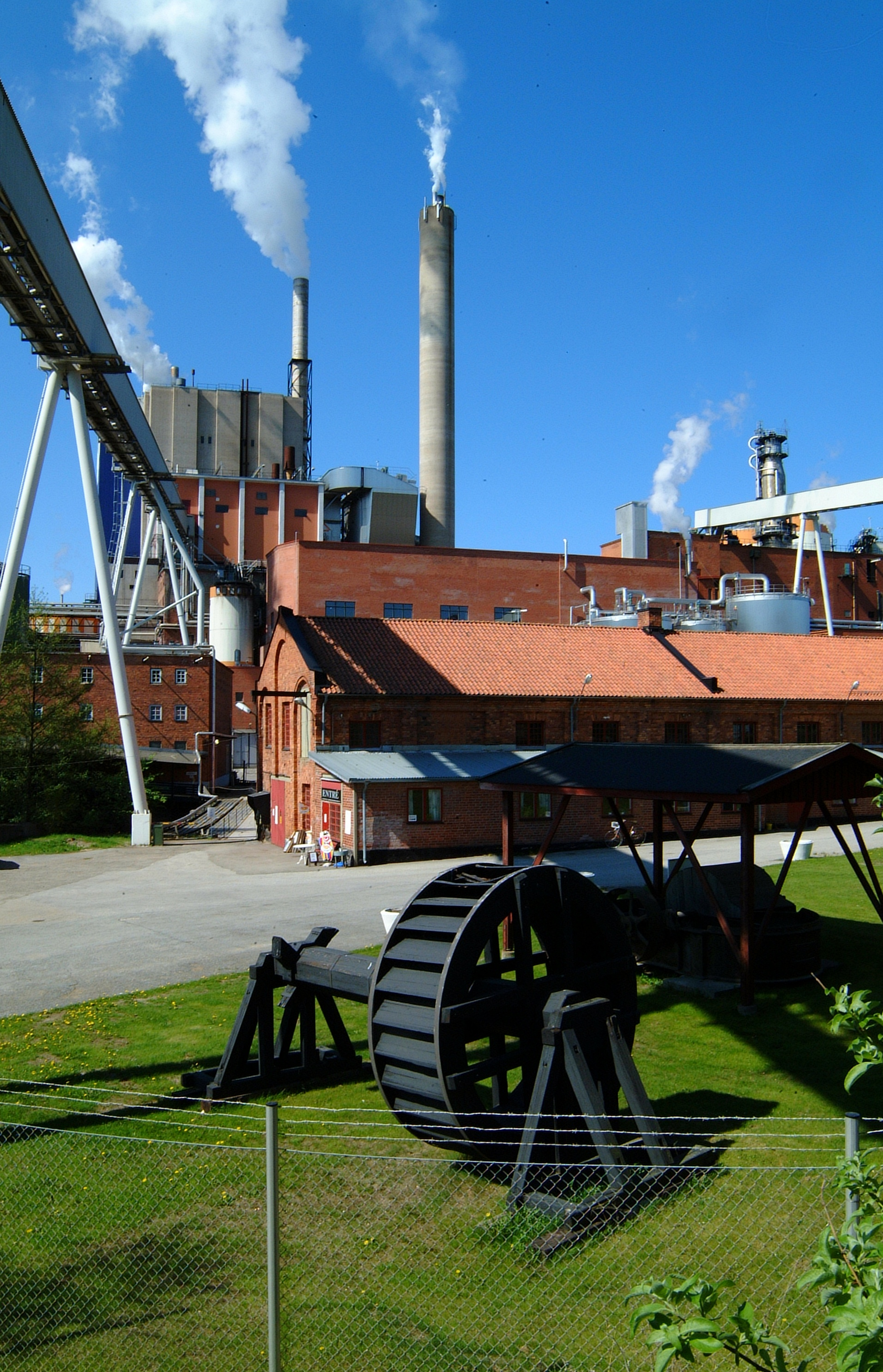 Frövifors pappersbruk